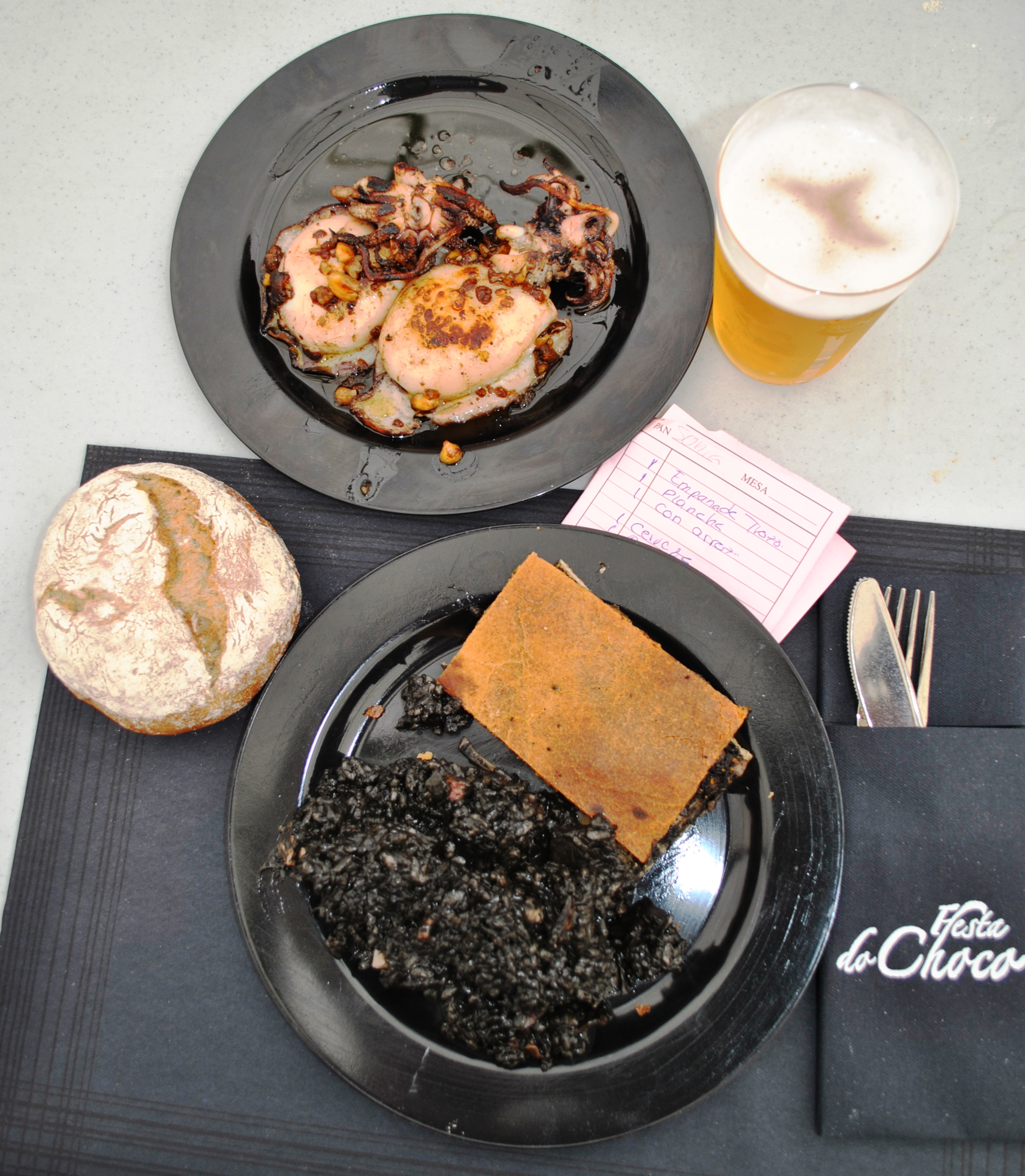 Véxase o título e as categorías.